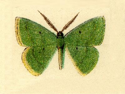 Phrudocentra kinstonensis